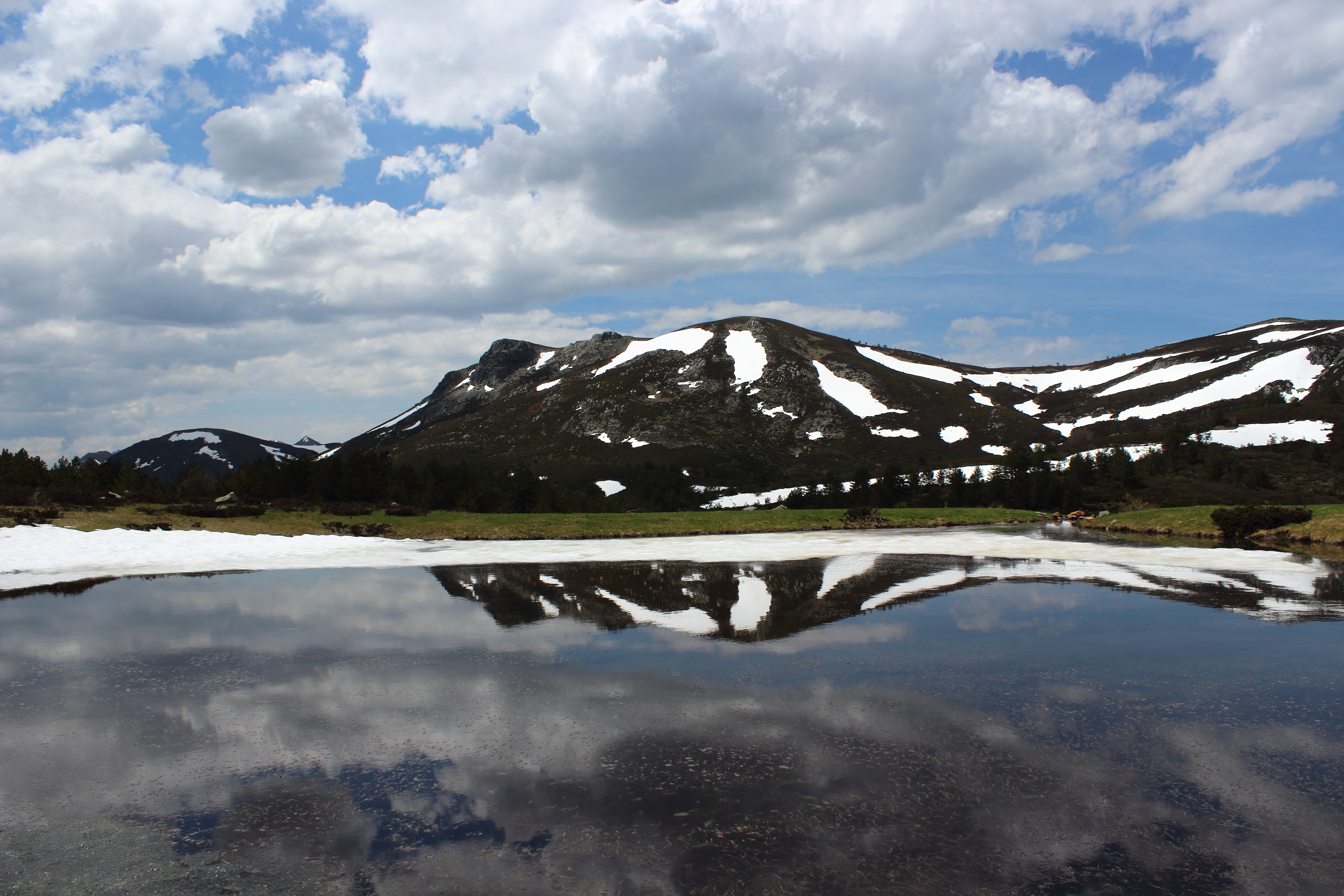 Picos de Europa en Castilla y León This is a photography of a Special Area of Conservation in Spain with the ID: ES4130003. Natura2000 entry, EEA entry